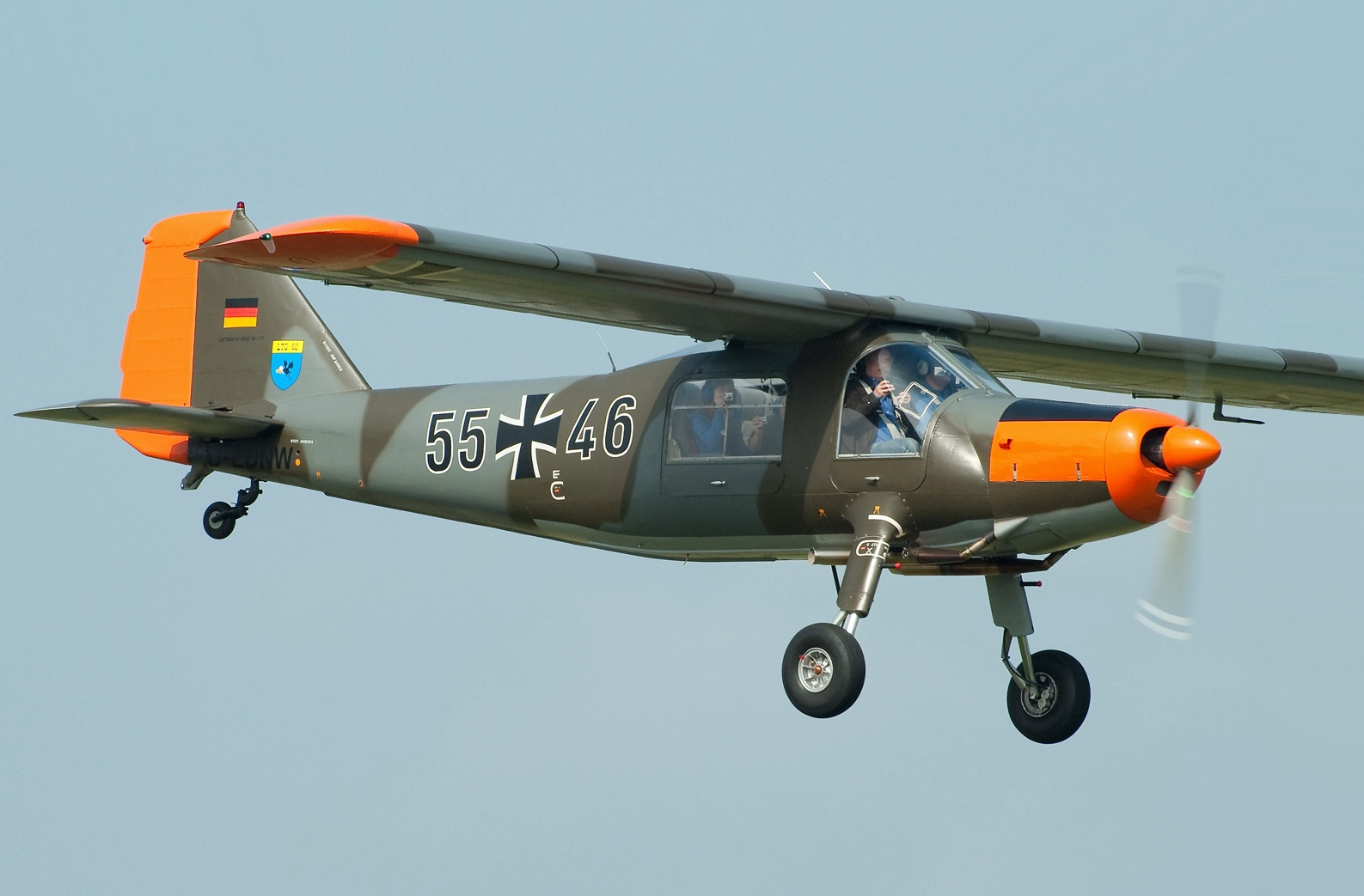 imx00000010